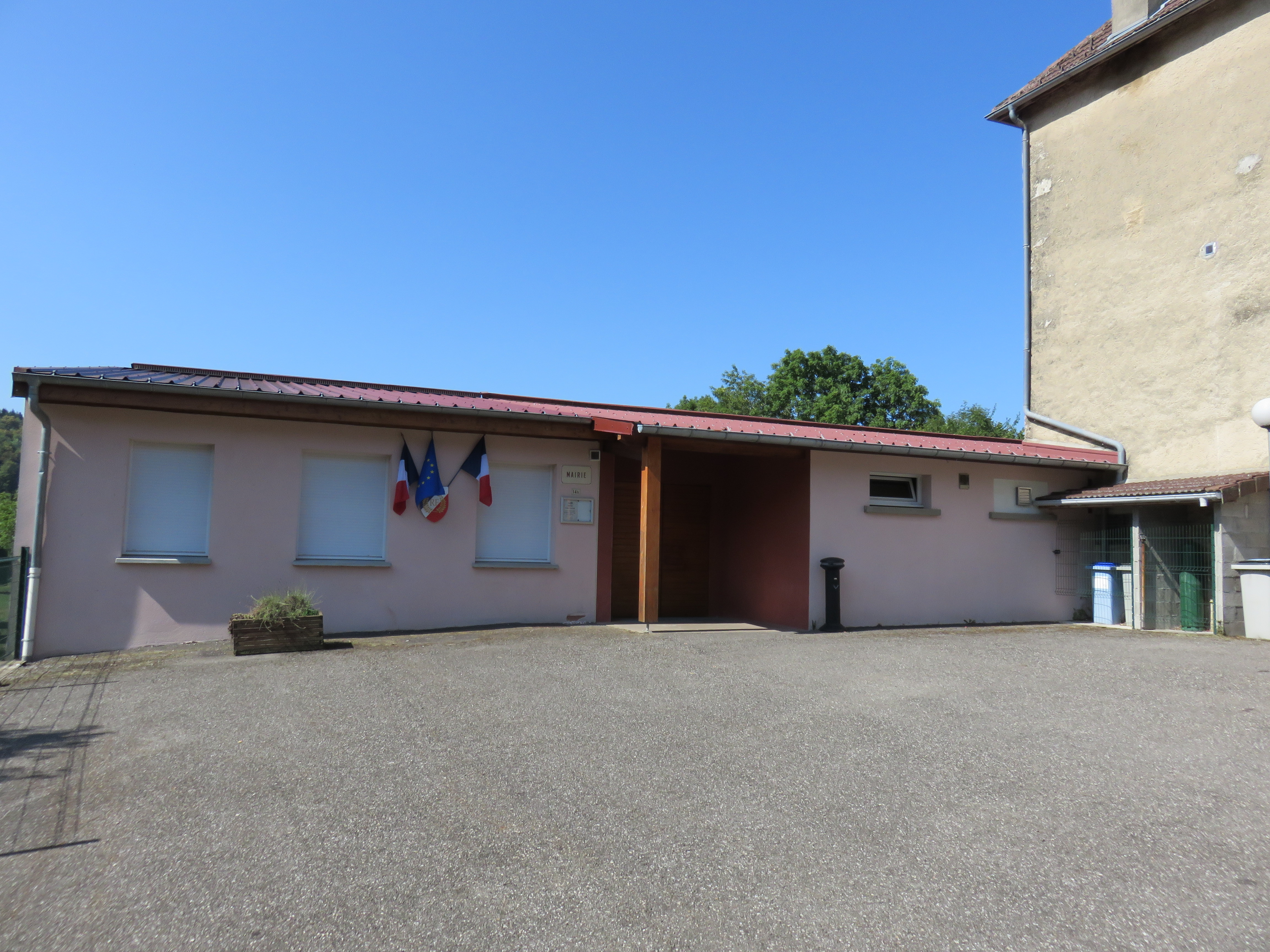 Mairie de Crenans (Jura, France).